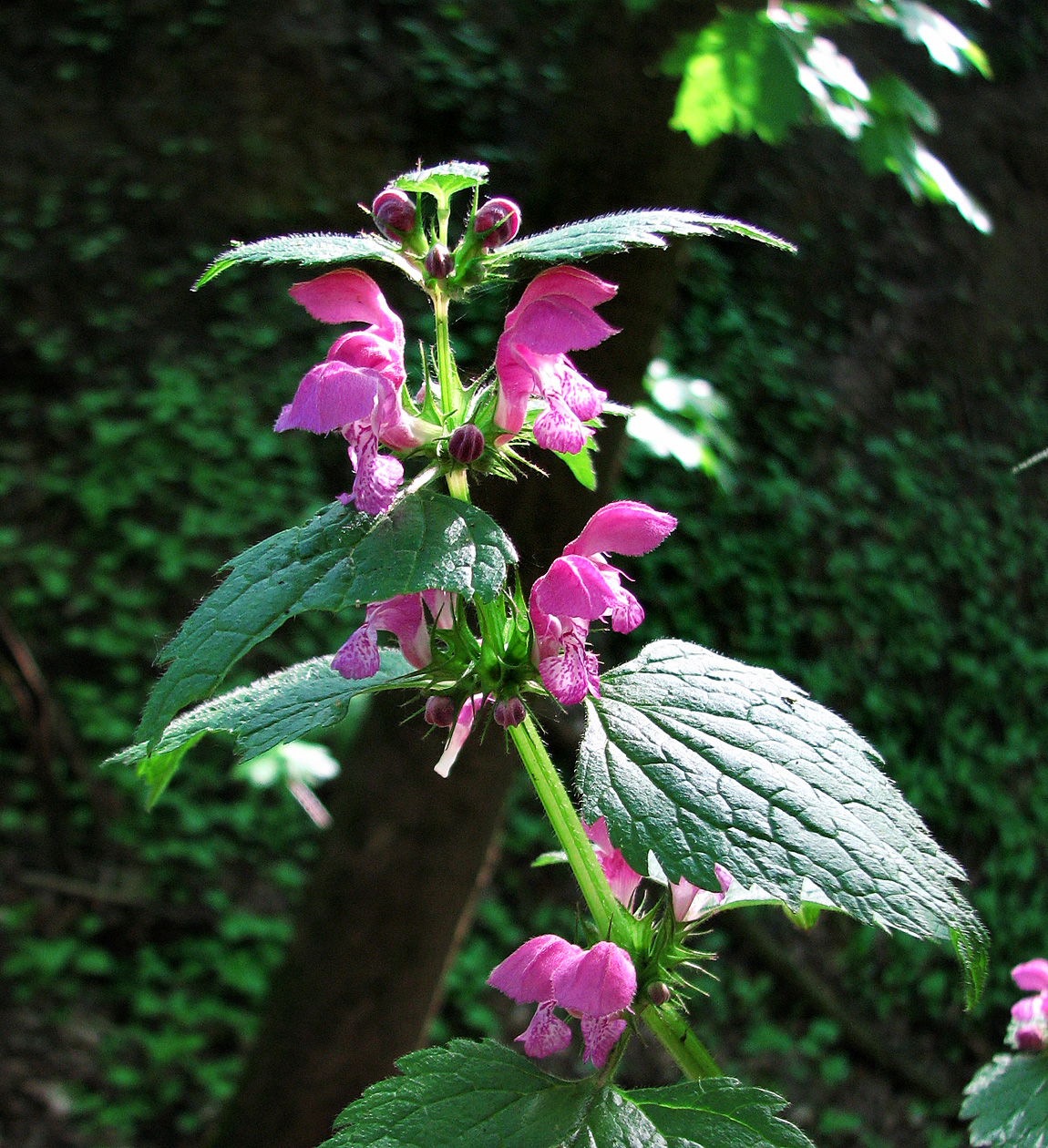 Глуха кропива крапчаста у Канівському природному заповіднику